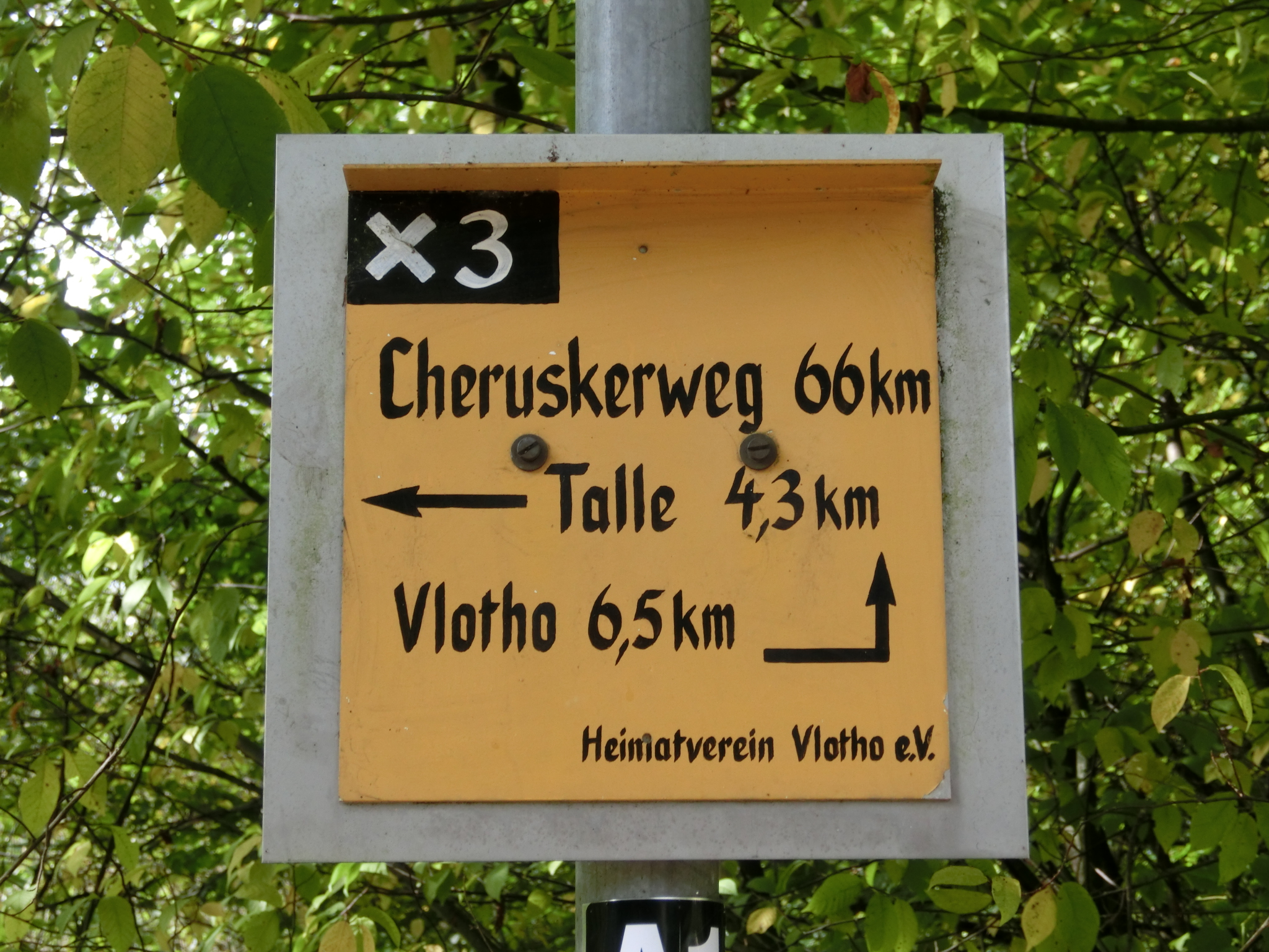 Cheruskerweg - Wegweiser in Vlotho, unterhalb des Selbergs, am "Naturlehrpfad Bonstapel"